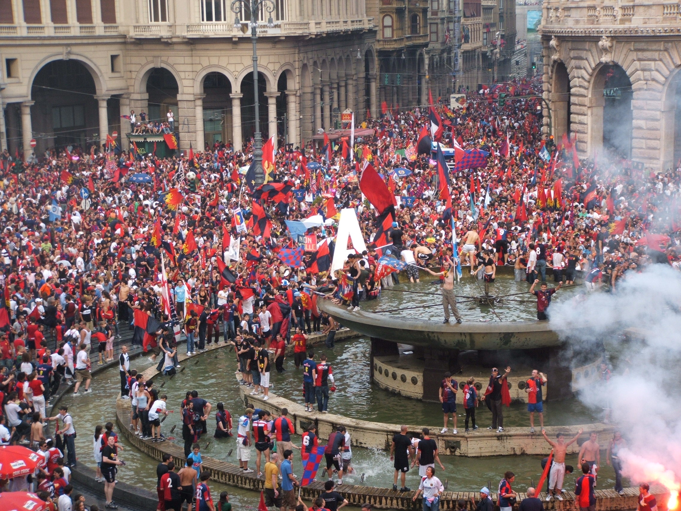 Genova, festeggiamenti per la promozione del Genoa CFC in Serie A